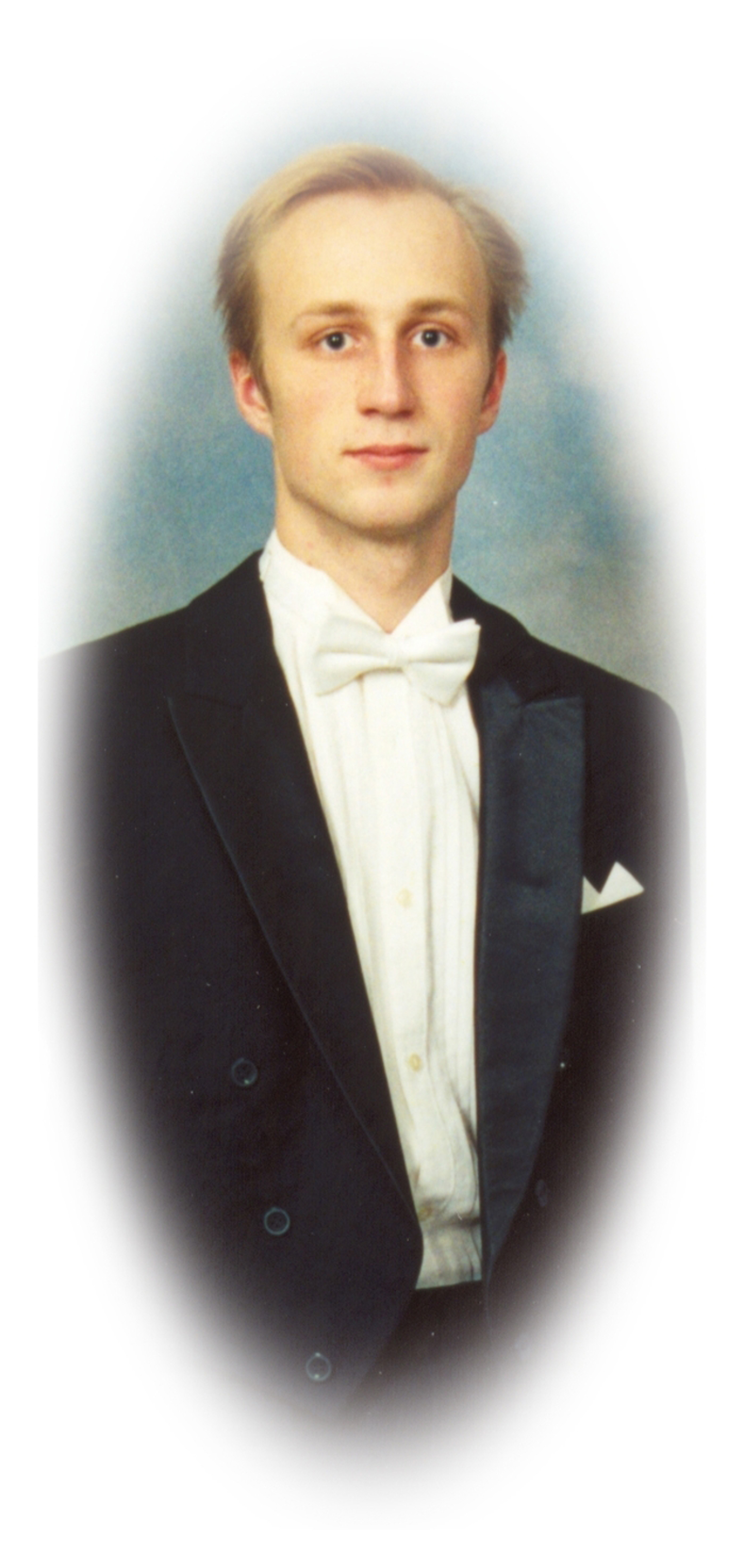 Raul Vester. Tartu